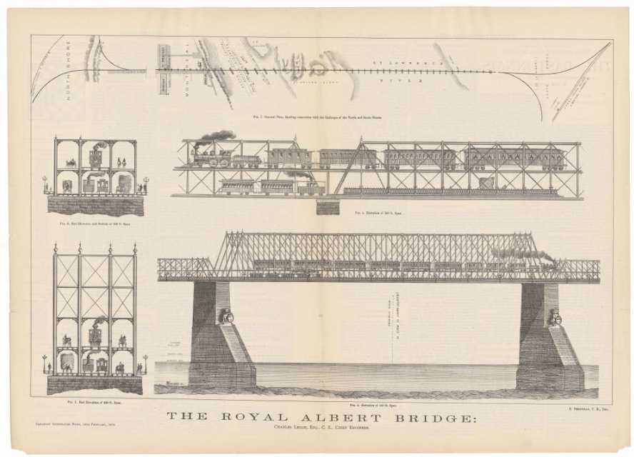 Détails de construction du projet du Royal Albert Bridge à Montréal en 1876